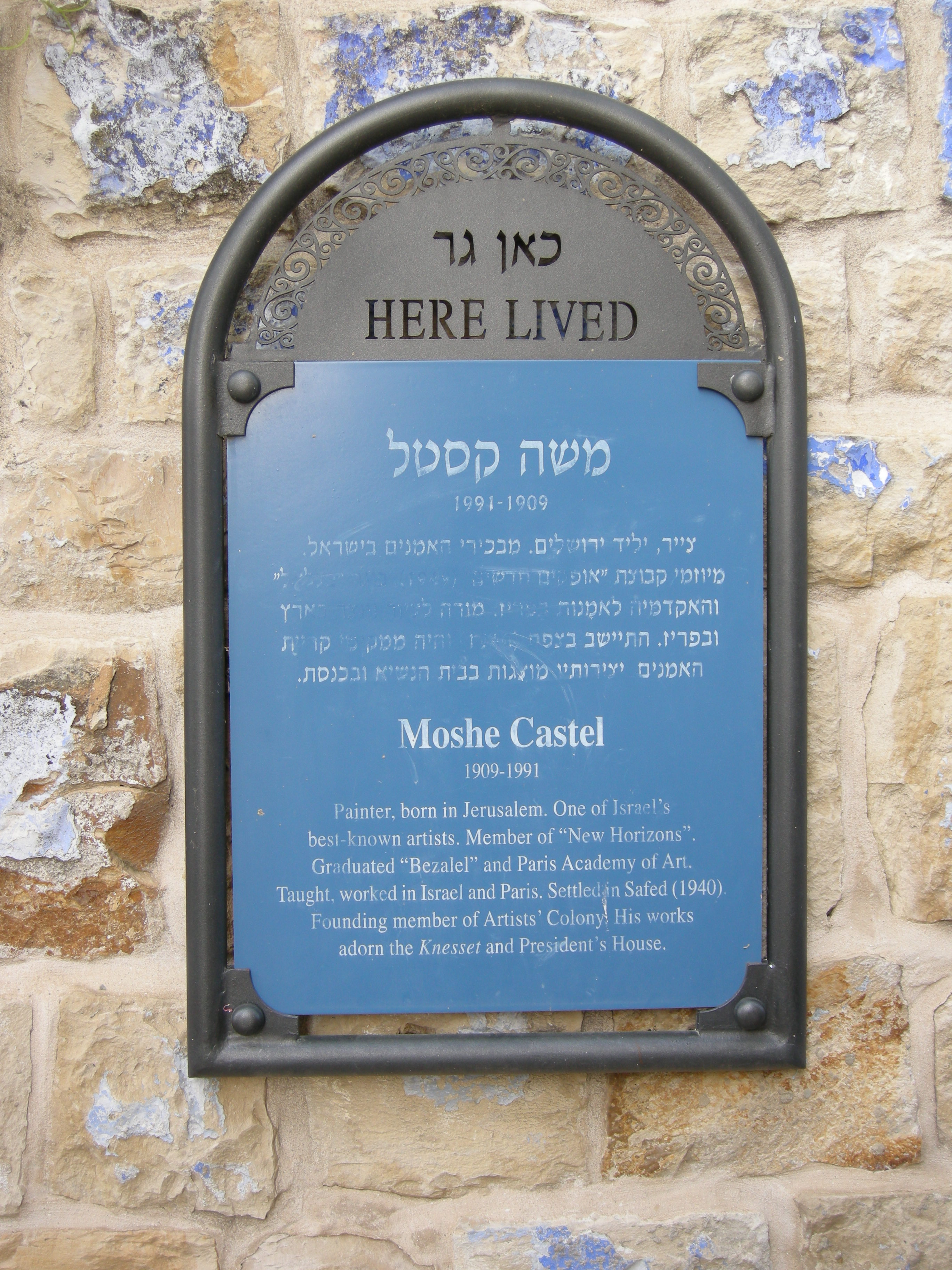 Safed